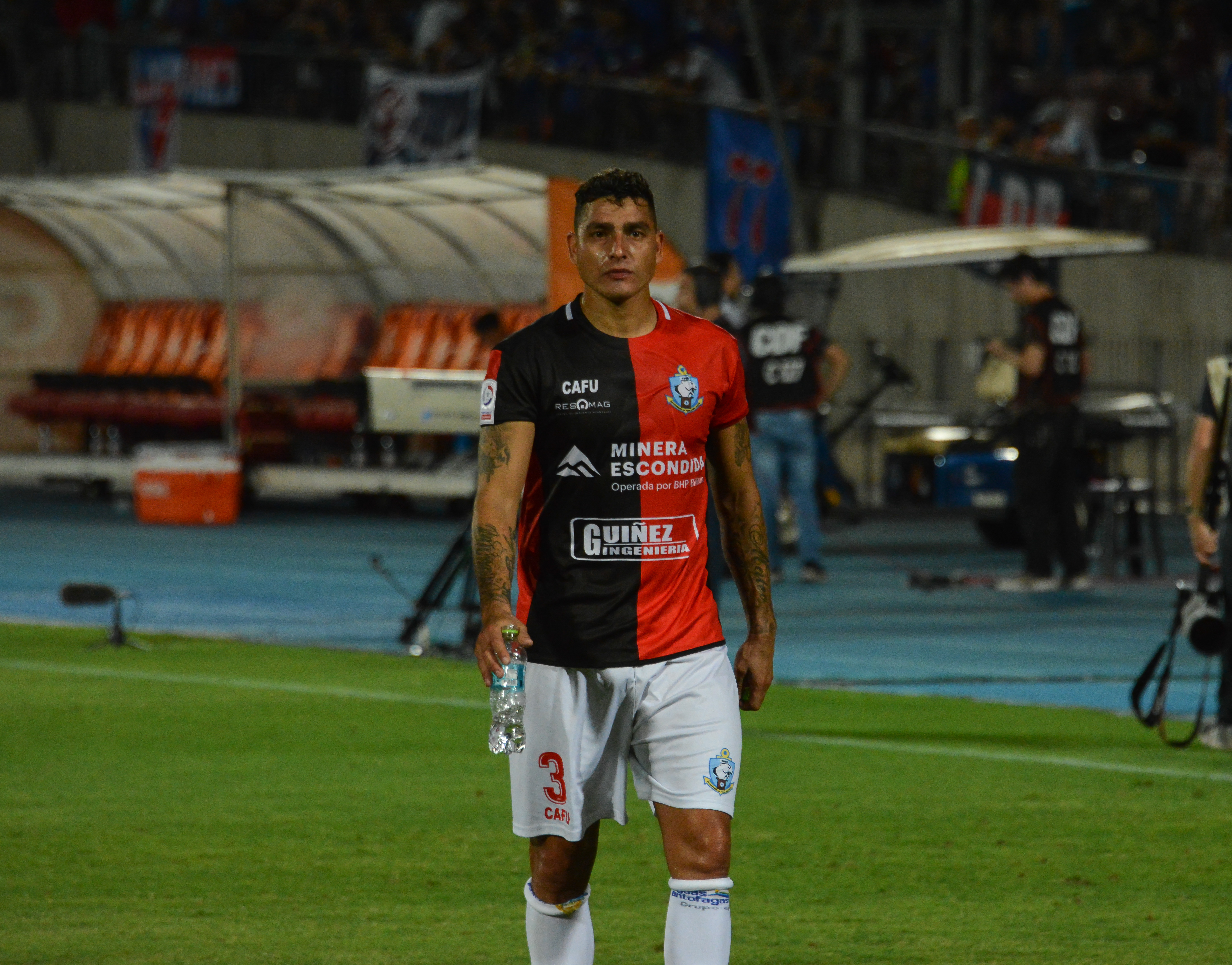 Bruno Romo, Universidad de Chile v Deportes Antofagasta, Estadio Nacional, Santiago, Chile.